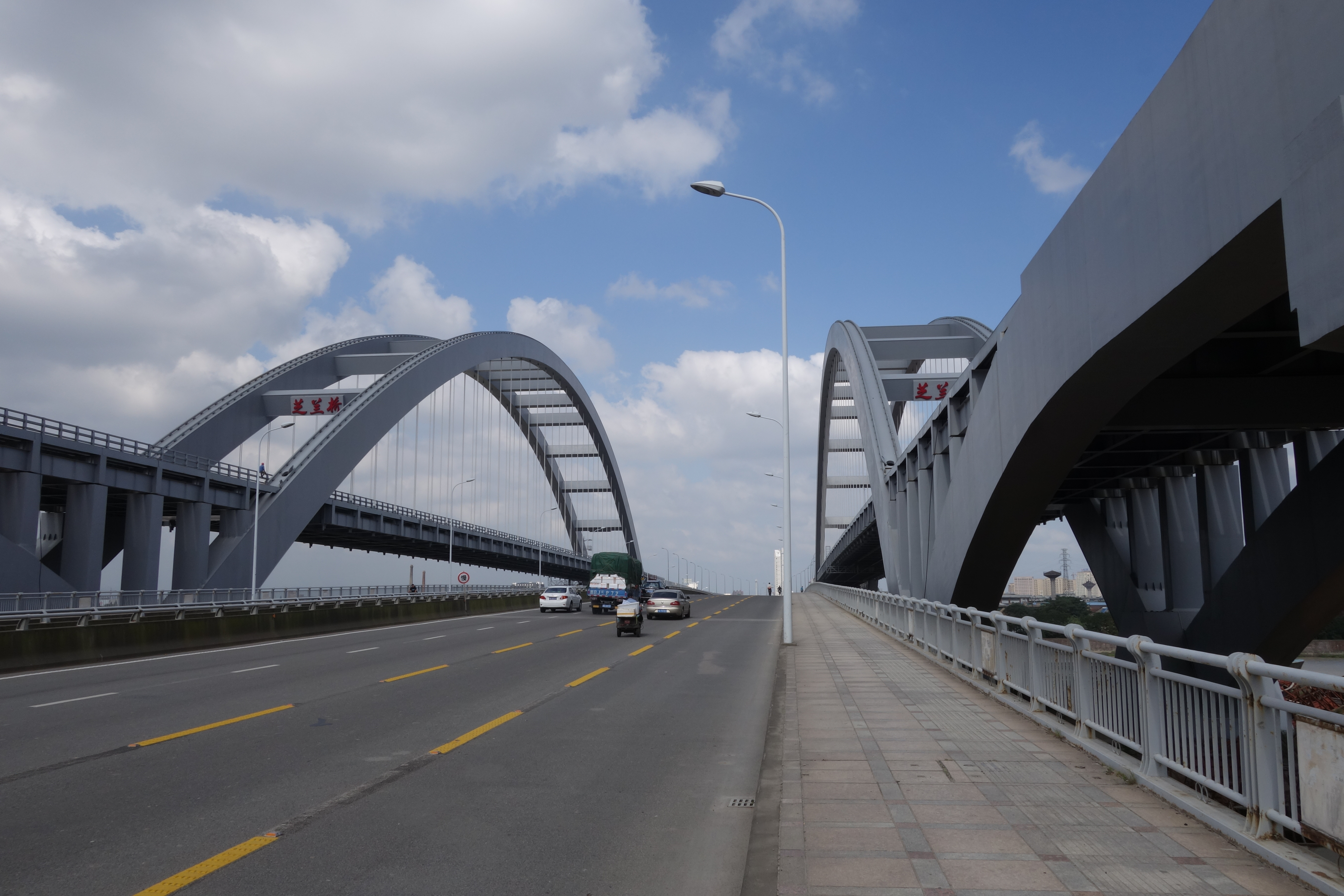 芝兰桥(环城南路高架)